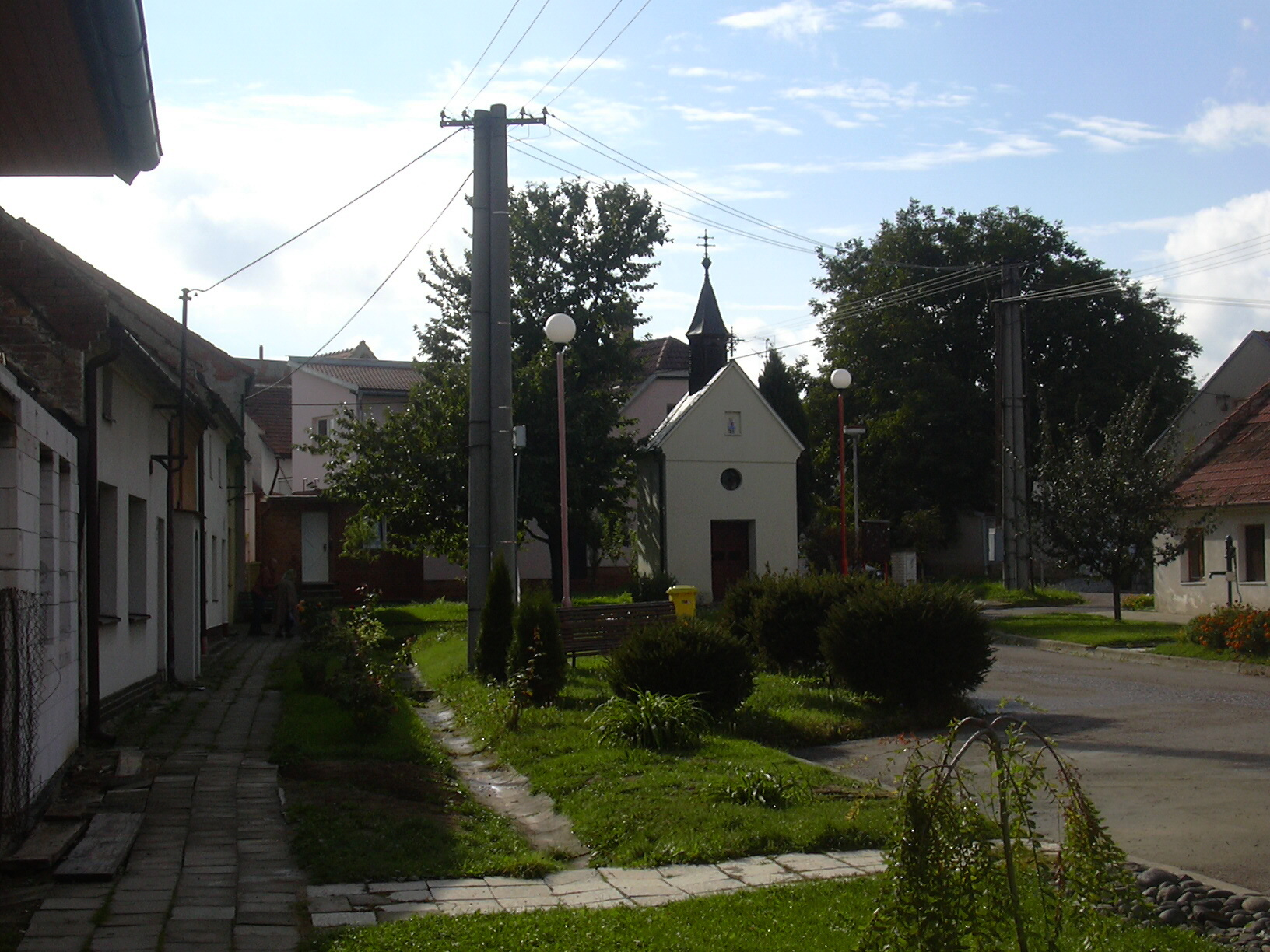 Kaple Pazderna (Vyškov) - Czech Republic